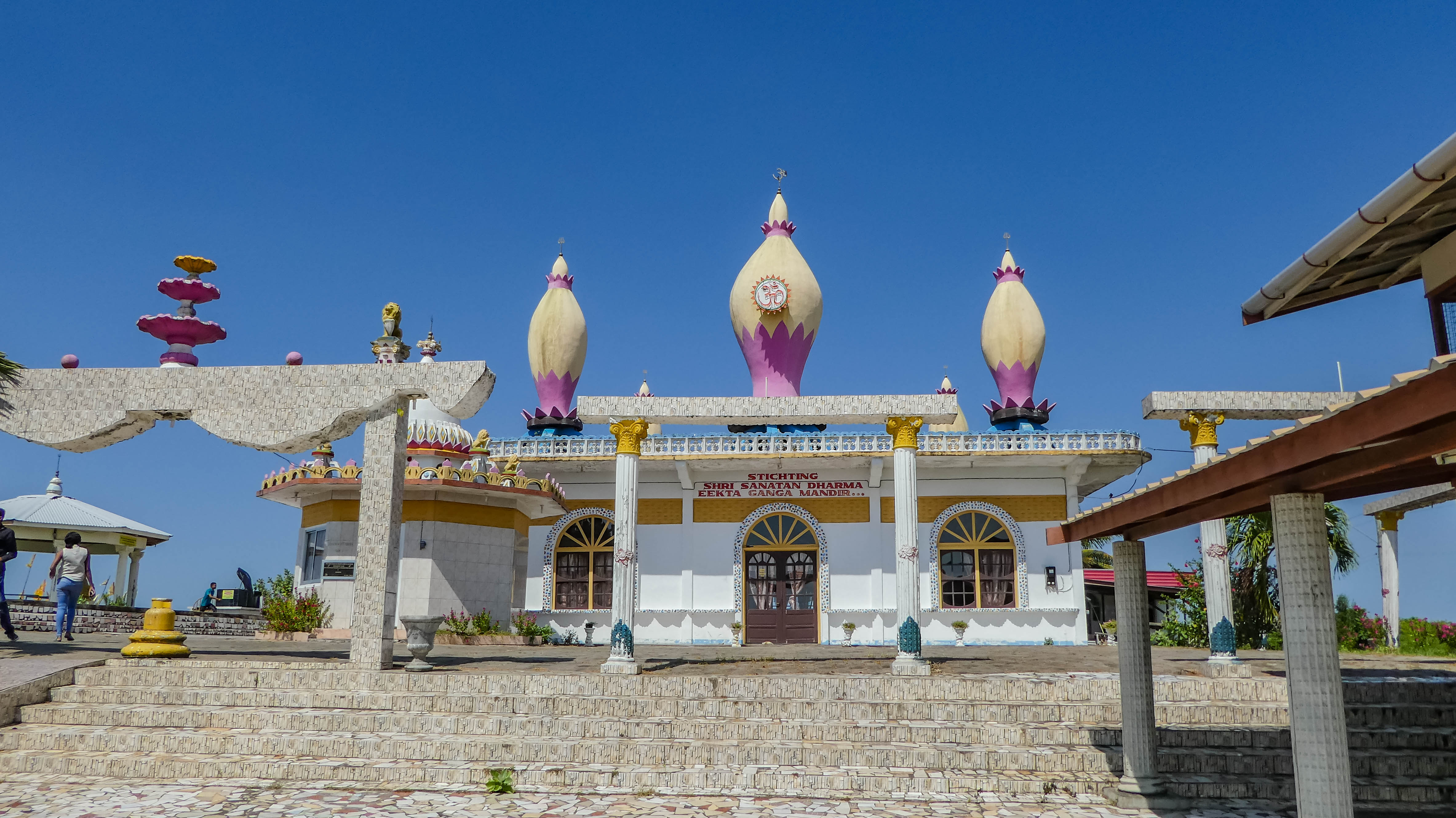 Hindoe temple in Nickerie